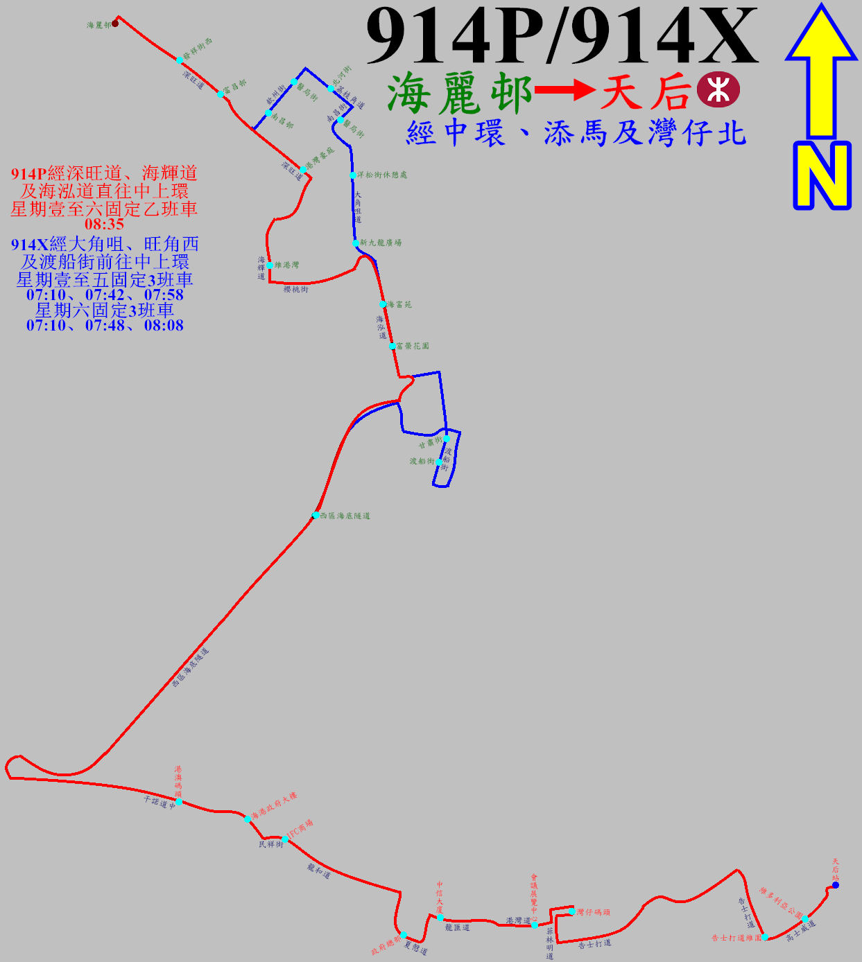 中文（香港）: 過海隧巴914P及914X線的走線圖，當中藍線表示只有914X才會梗經的